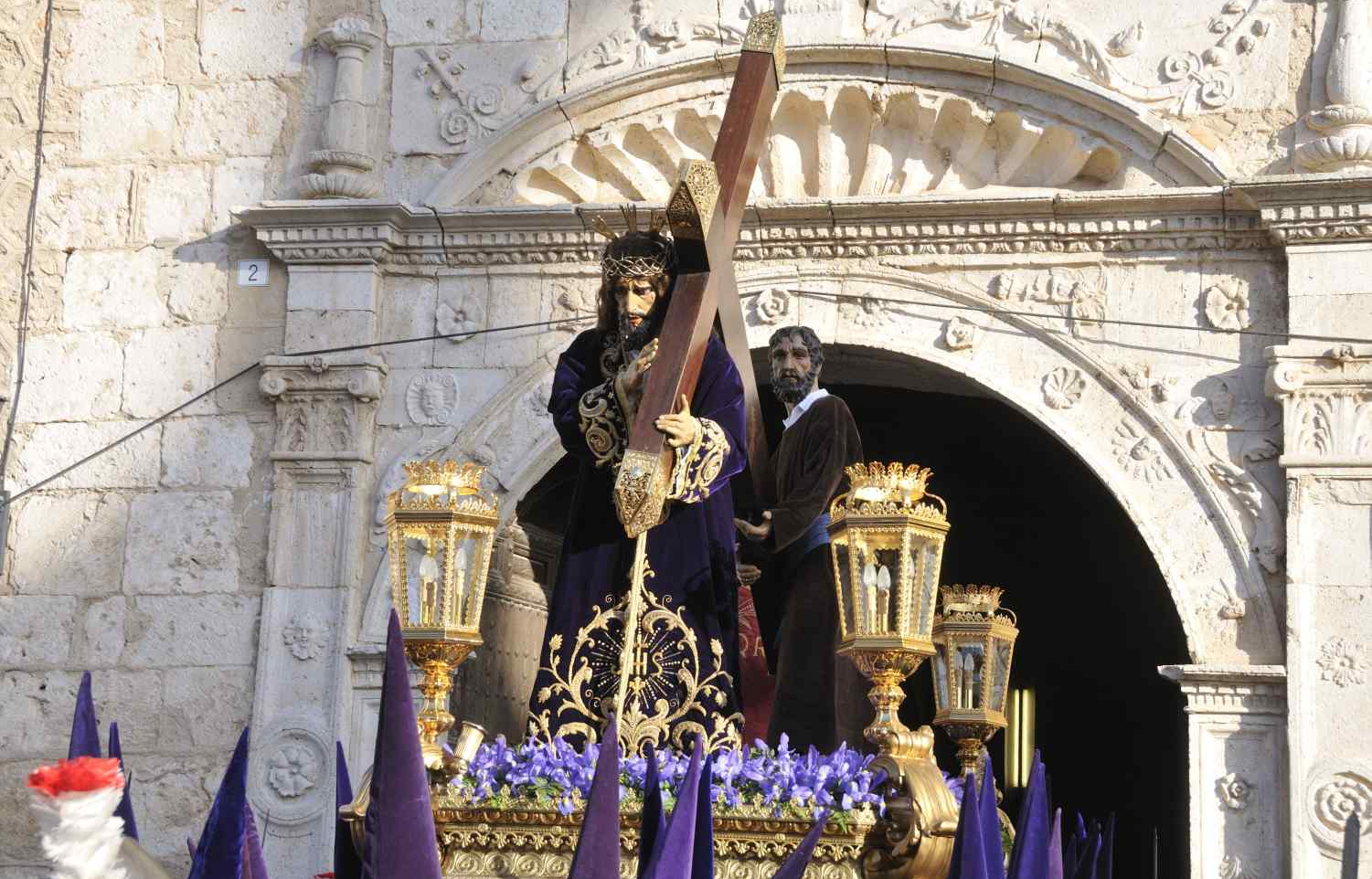 Ntro. Padre Jesús Nazareno de Ocaña (Toledo)